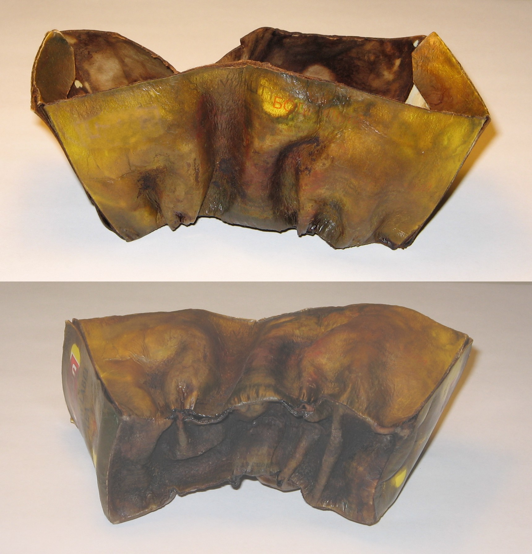 Papera skatolo, malsekigita kaj sekigita multfoje.